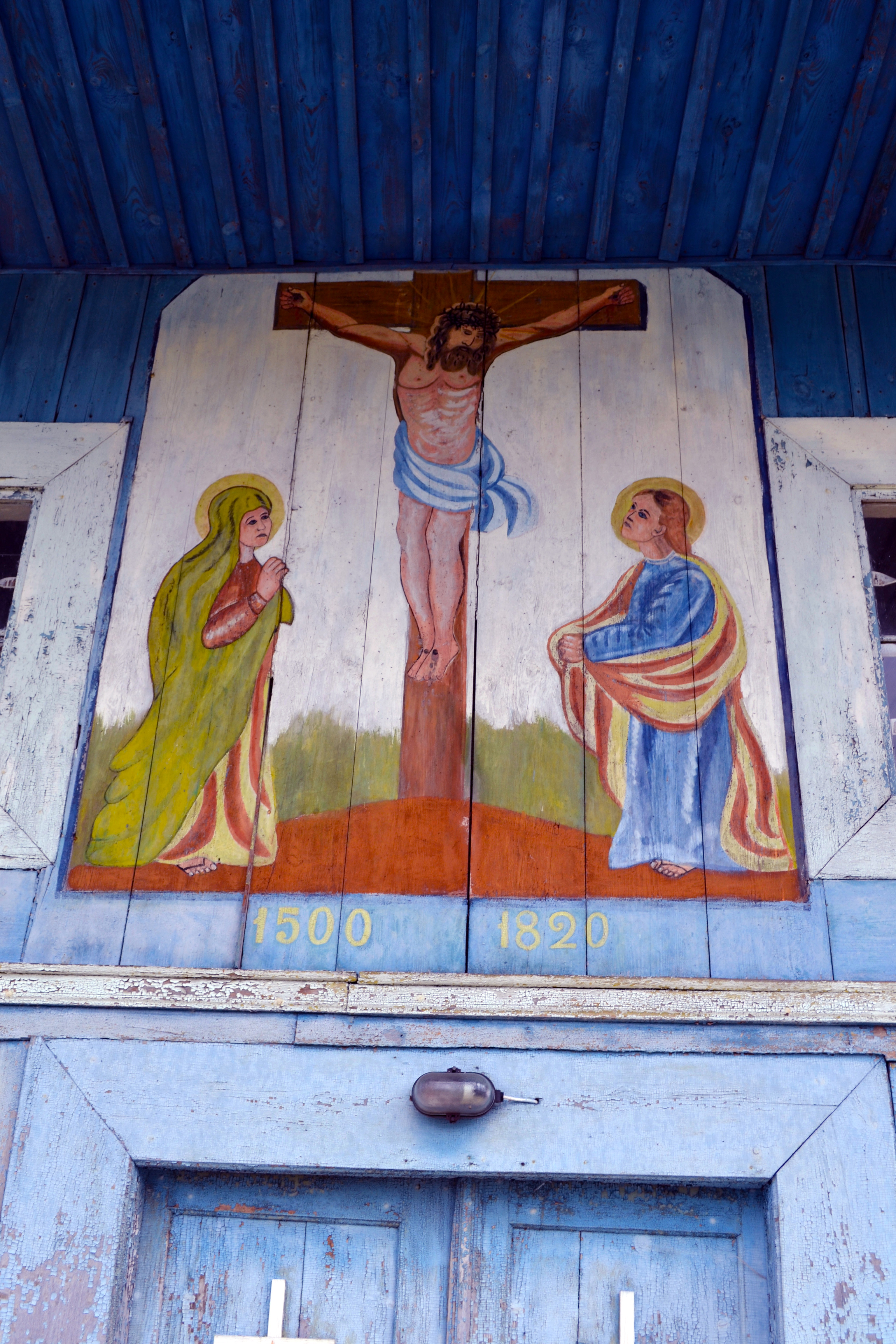 Беларуская (тарашкевіца): Петрапаўлаўская царква на шарашоўскіх могілках